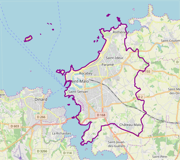 carte réalisée sur umap This map may be incomplete, and may contain errors. Don't rely solely on it for navigation.